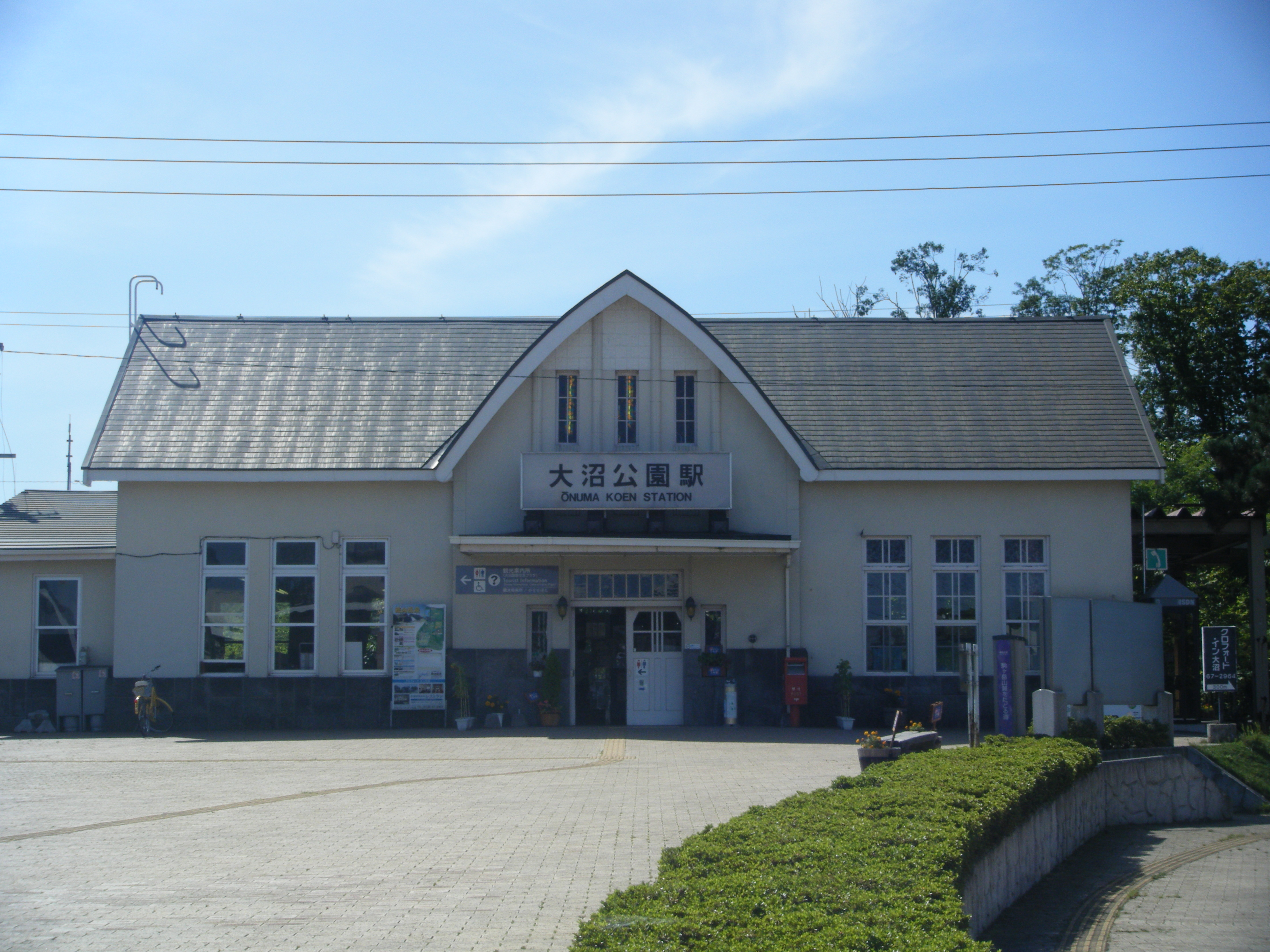 大沼公園駅（JR北海道 函館本線）